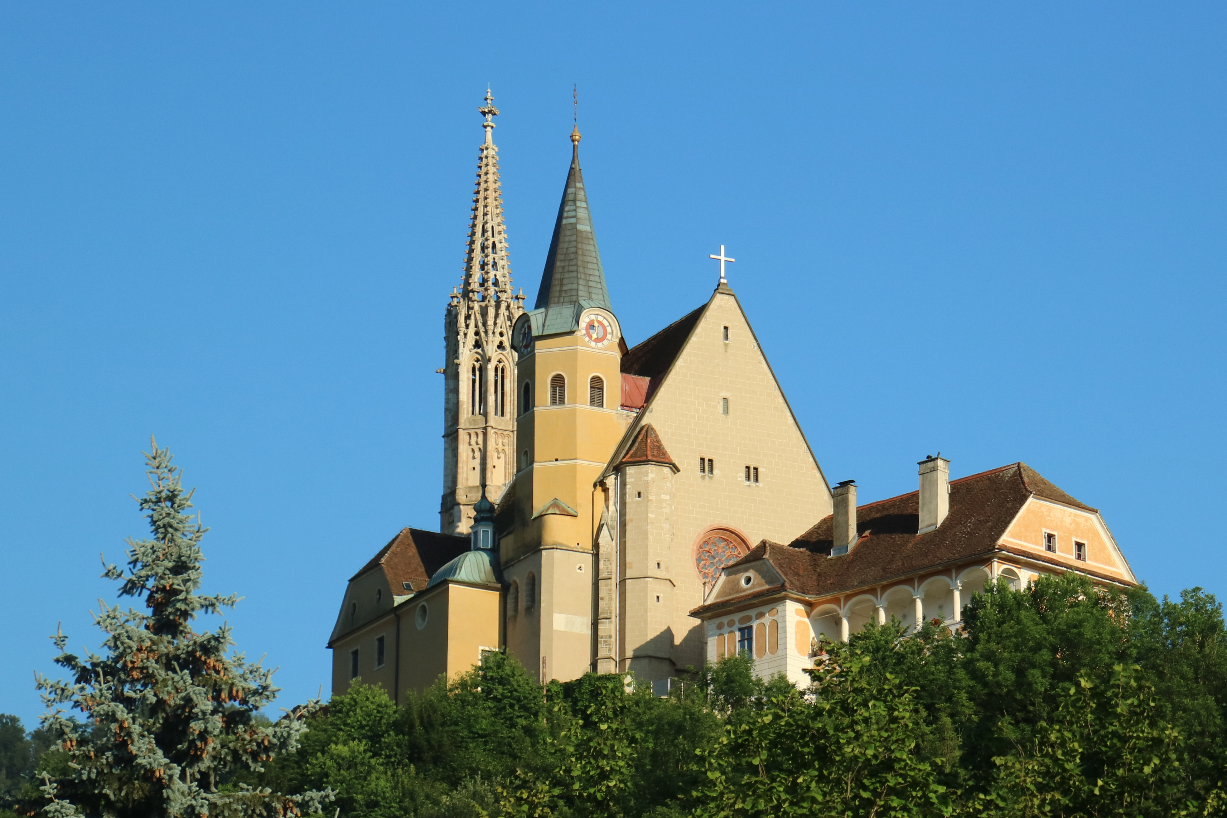 Wallfahrtskirche Maria Straßengel, Gemeinde Gratwein-Straßengel (Steiermark)